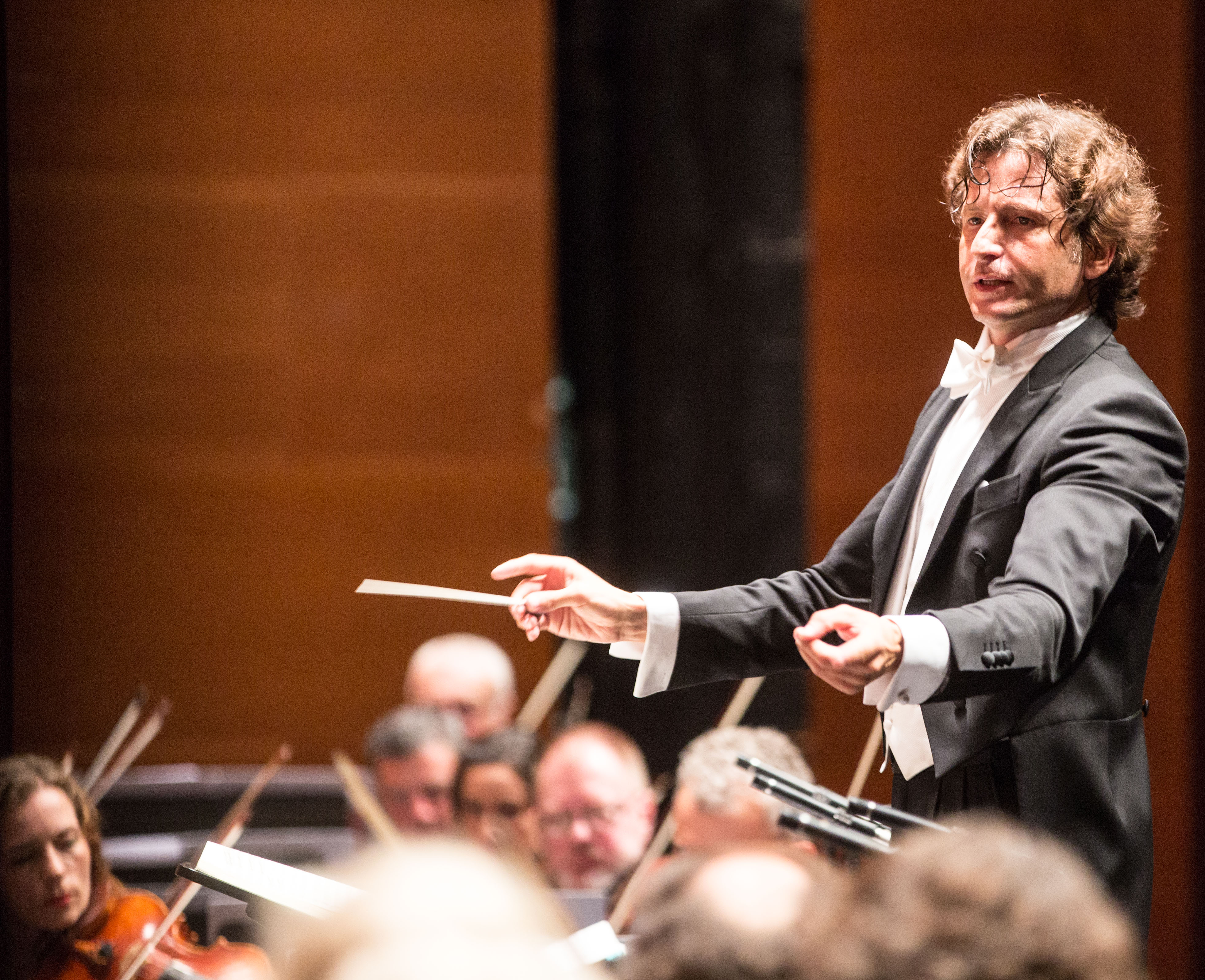 ©Quincena Musical-Iñigo Ibáñez